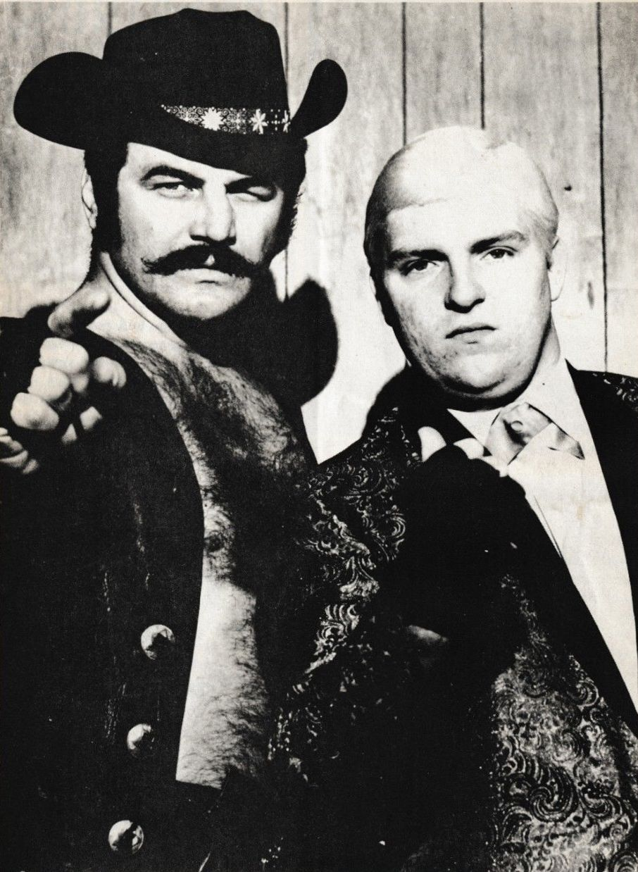 Black Jack Lanza & Bobby Heenan dans le no.46 du magazine The New Illustrated Wrestling News de 1971